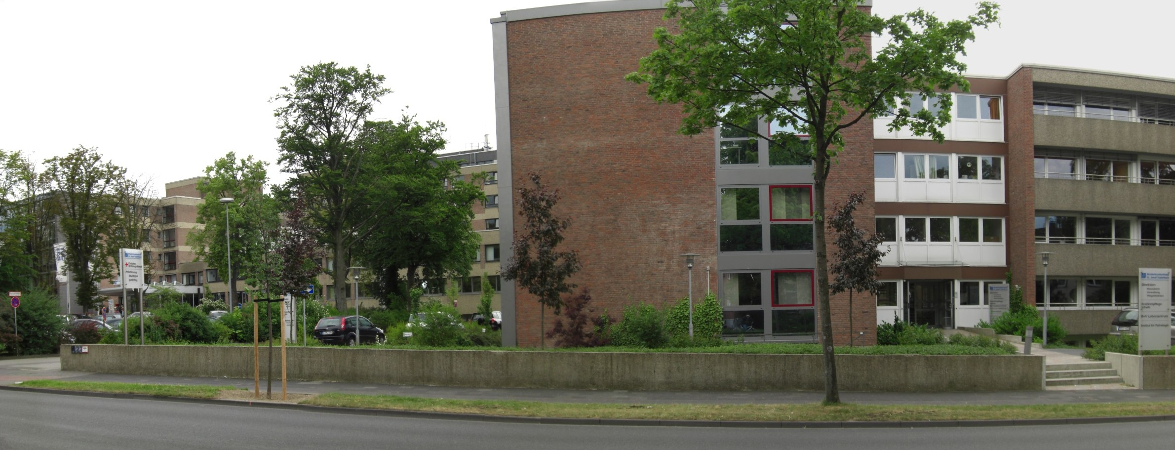 Brüderkrankenhaus St. Joseph Paderborn